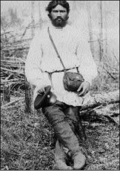 С.И. Расторгуев